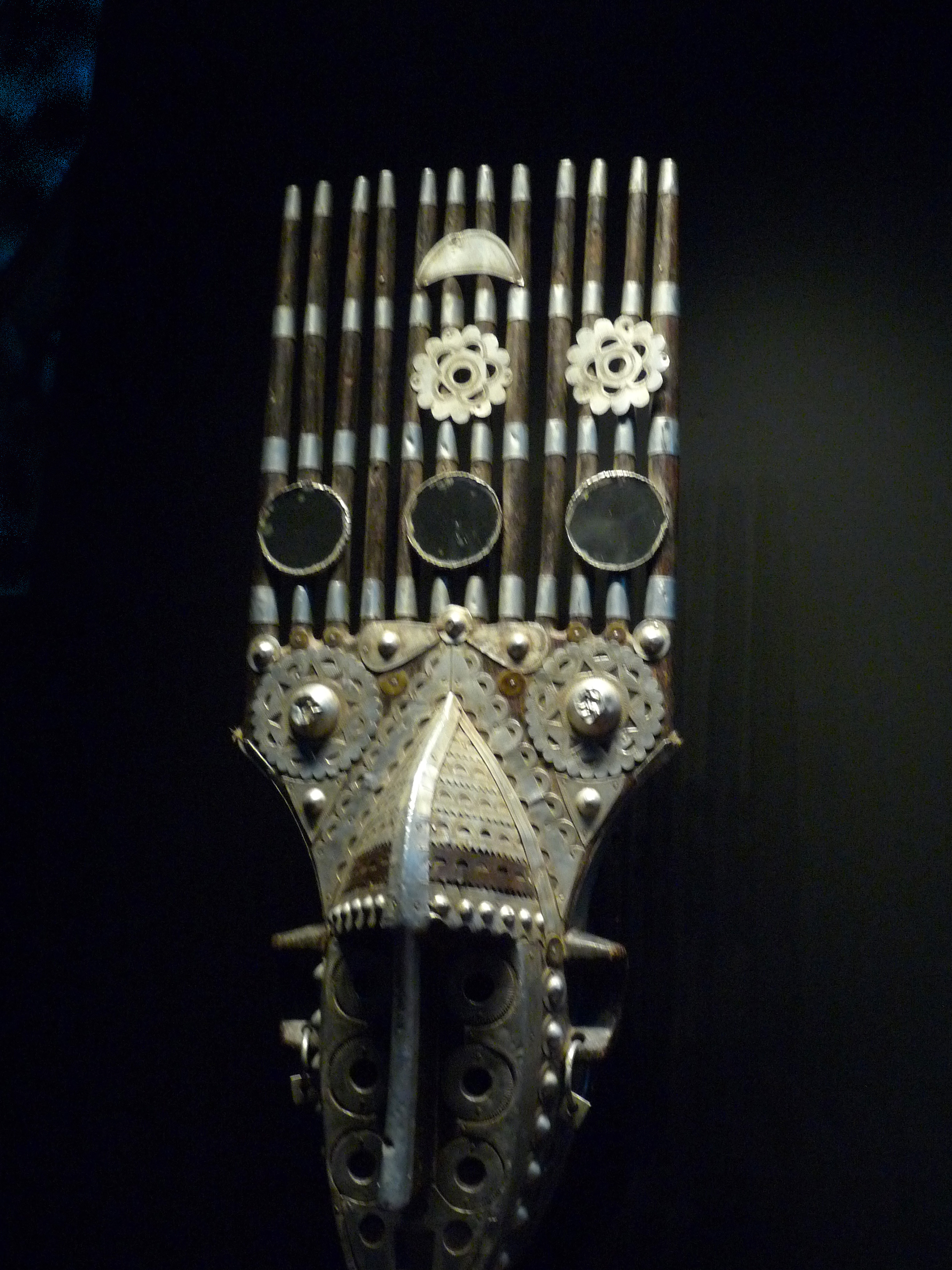 Masque, société d'initiation du Konden, population Malinké, Guinée. 20e siècle. Bois, aluminium, laiton, miroir. Musée du quai Branly.